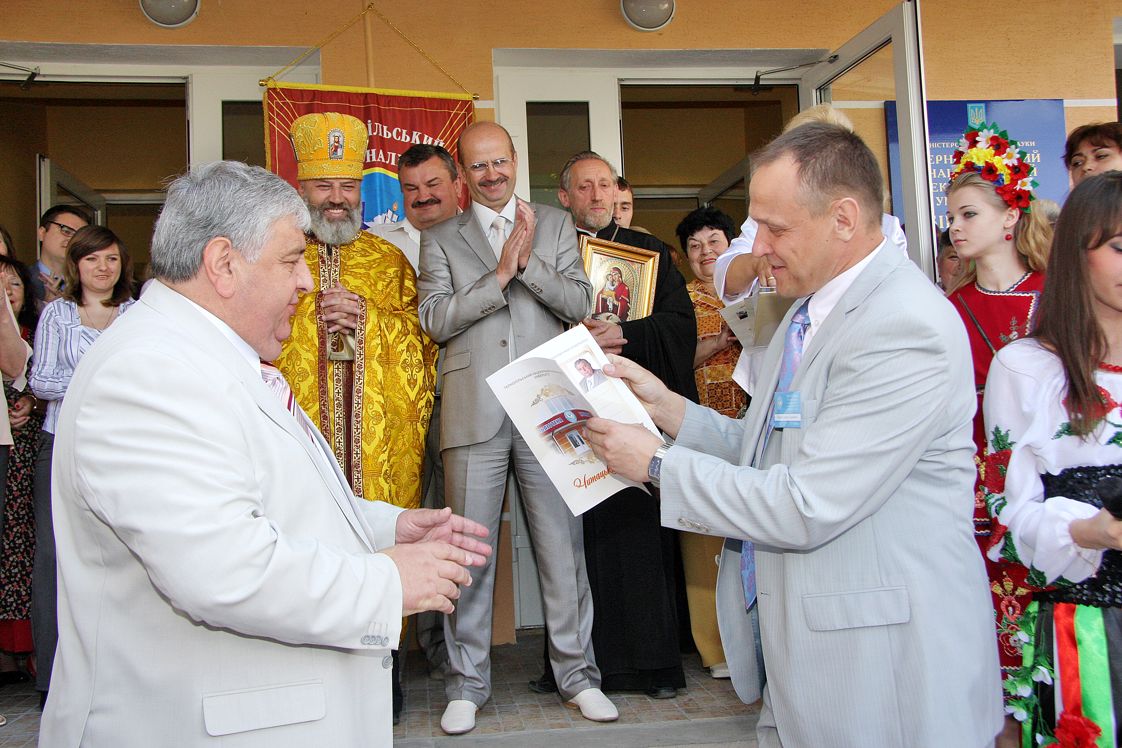 Читач номер один – ректор ТНЕУ, Сергій Юрій